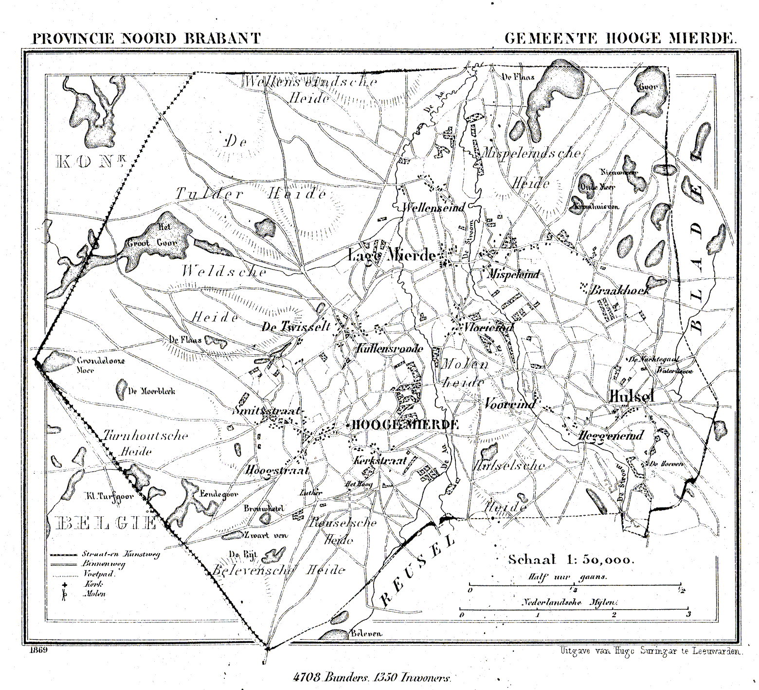 Nederland, Noord-Brabant, Gemeente Hoogemierde